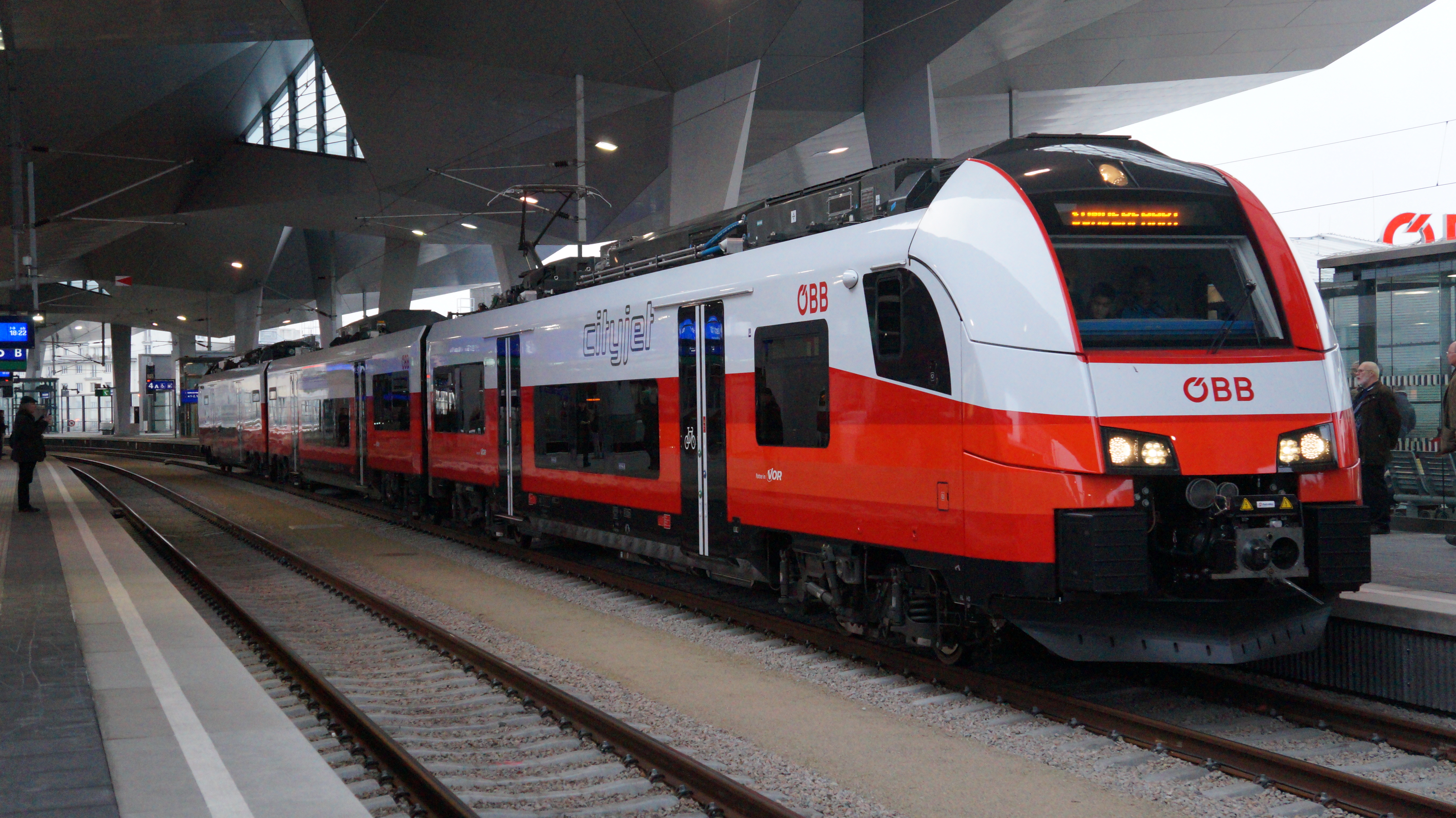 Cityjet bei der Präsentation am Wiener Hauptbahnhof im März 2015